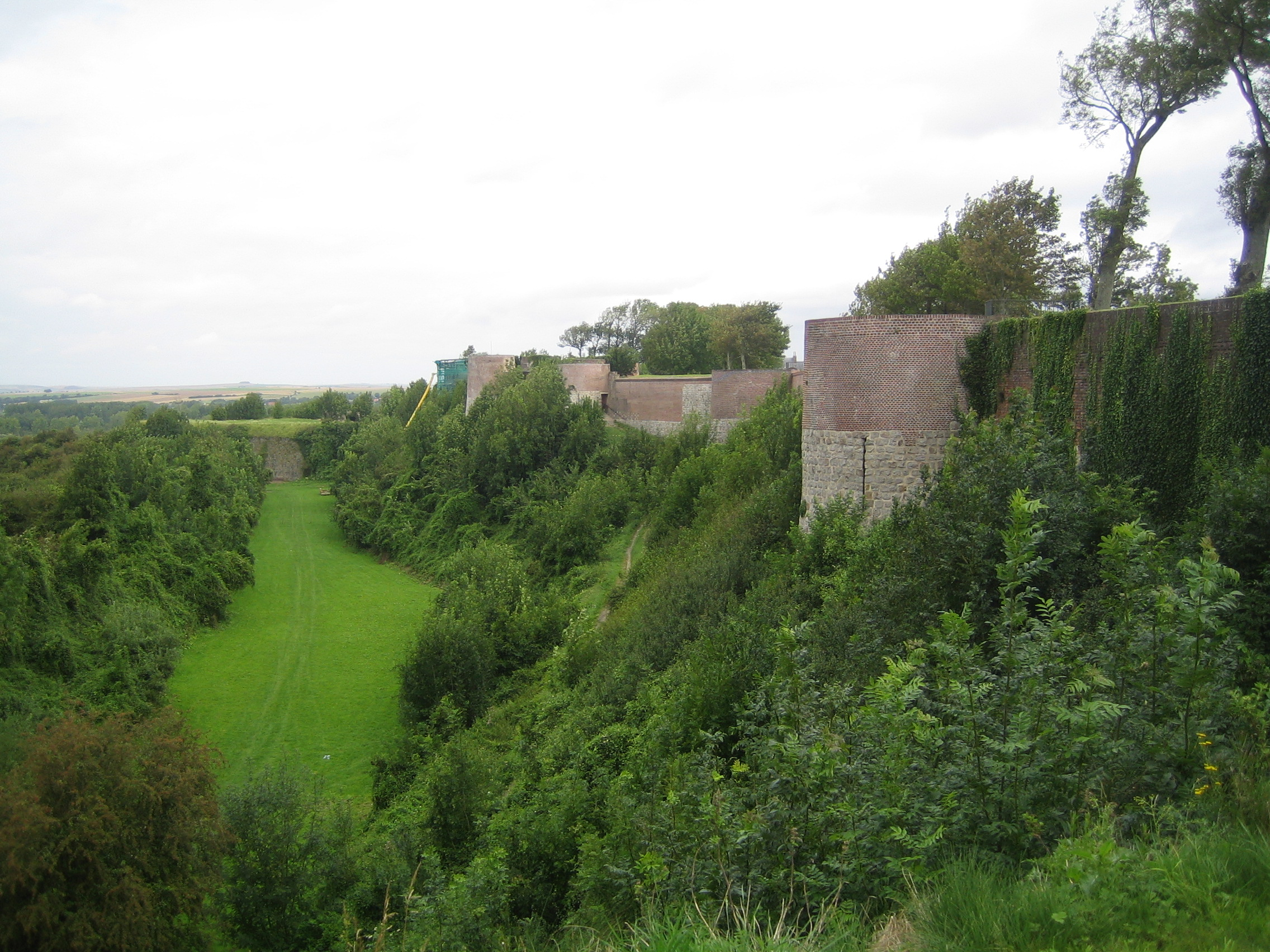 Remparts de Montreuil-sur-Mer